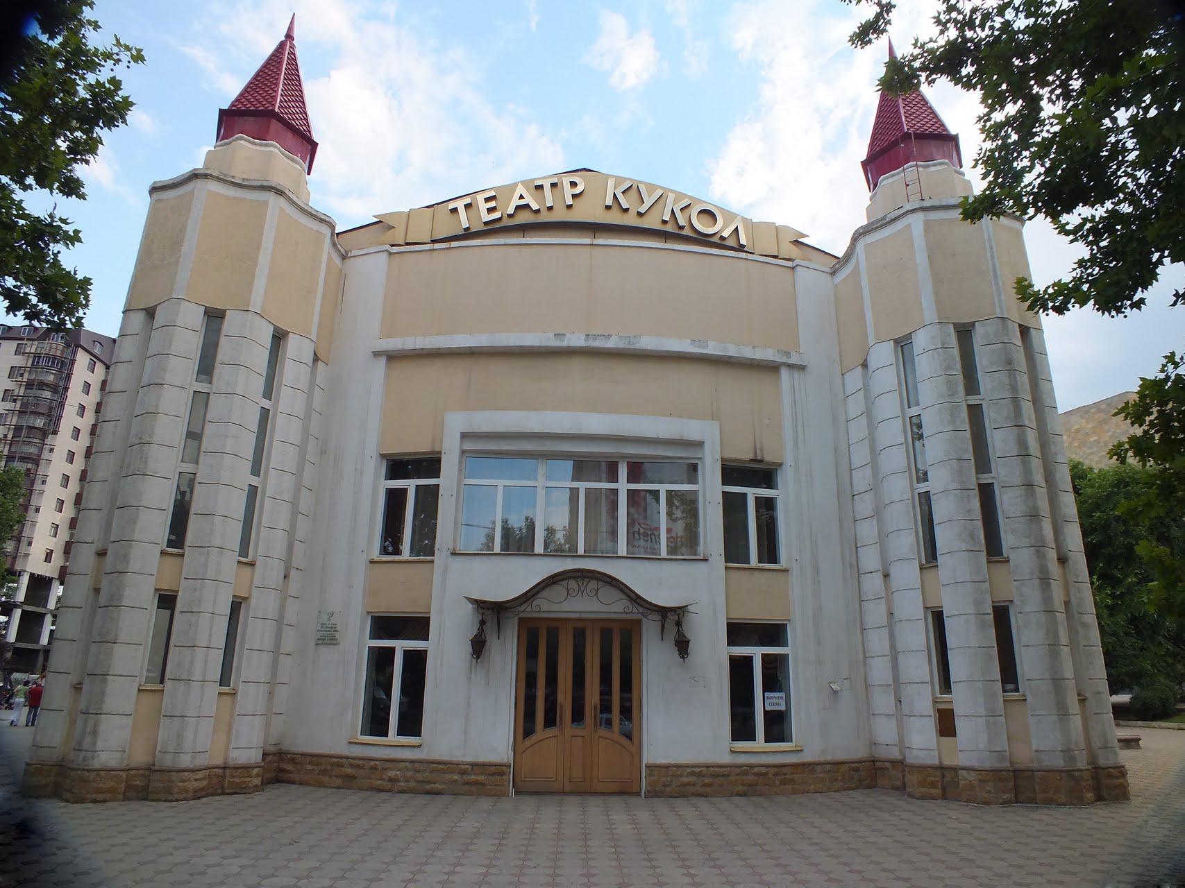 Театр кукол в Махачкале